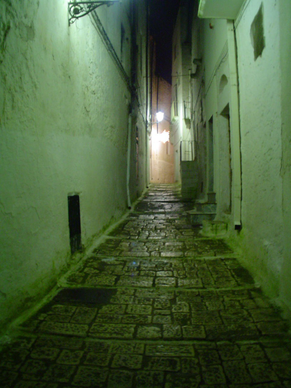 foto non professionali e assolutamente di pubblico dominio da me fatte in data 01/01/06